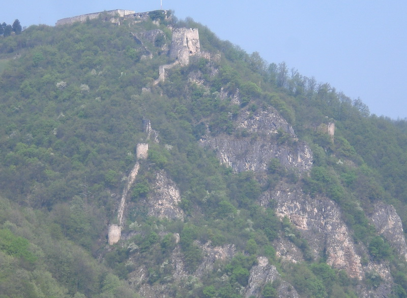 Зворничка тврђава Ђурђев-град. Још се не зна кад је град направљен, дограђиван је и обнављан у зависности ко је град заузимао.